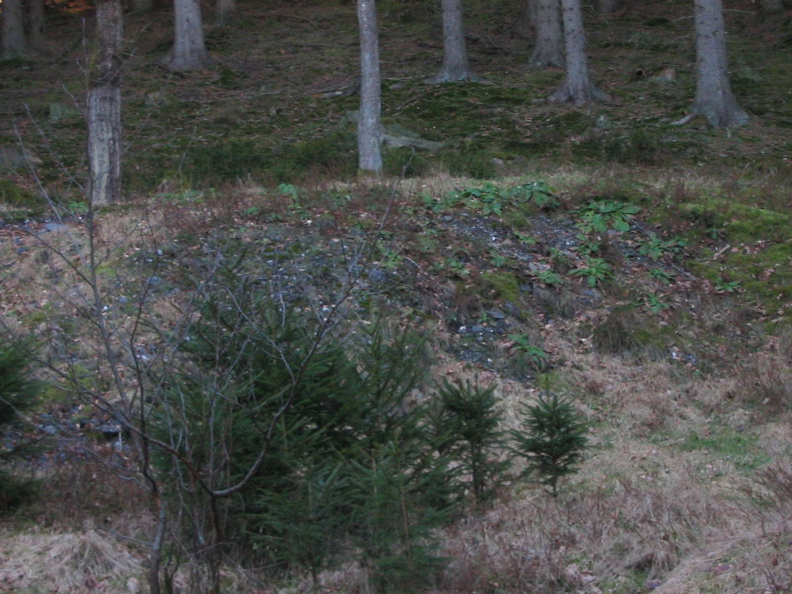 Bergbaureste (Halde) der Grube "Heinrichsglück" in Salchendorf / Slag heap of mining in "Heinrichsglück" mine in Salchendorf